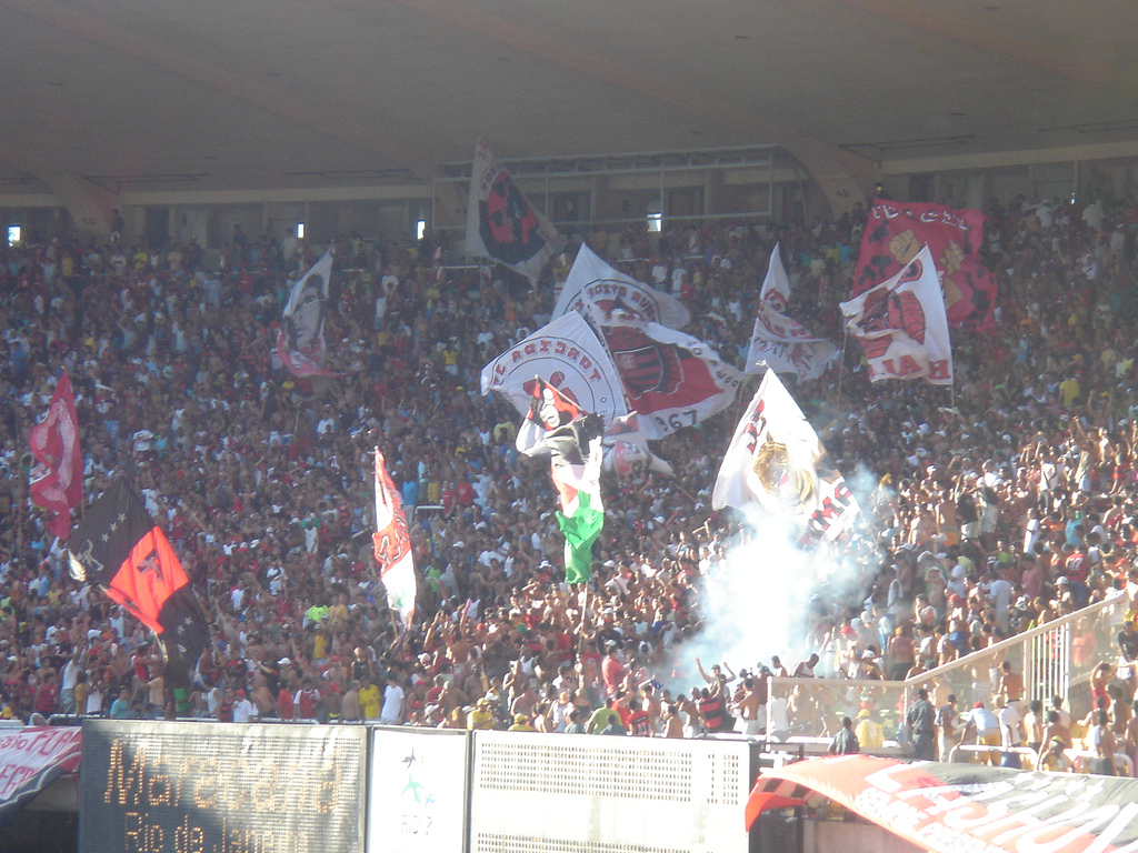 Festejando el gol Flamengo